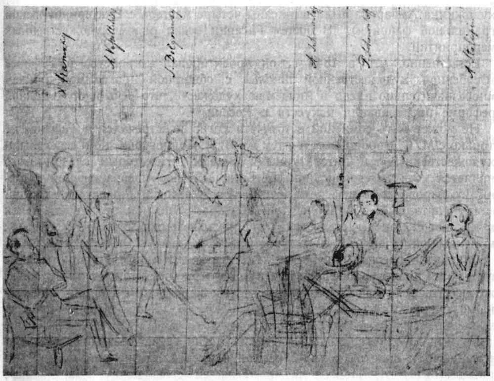 Справа налево: К. Браницкий, А. Васильчиков, С. Долгоруков, А. Шувалов, П. Шувалов, А. Столыпин